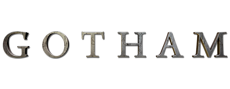 Logo aus dem Fernsehprogramm Gotham